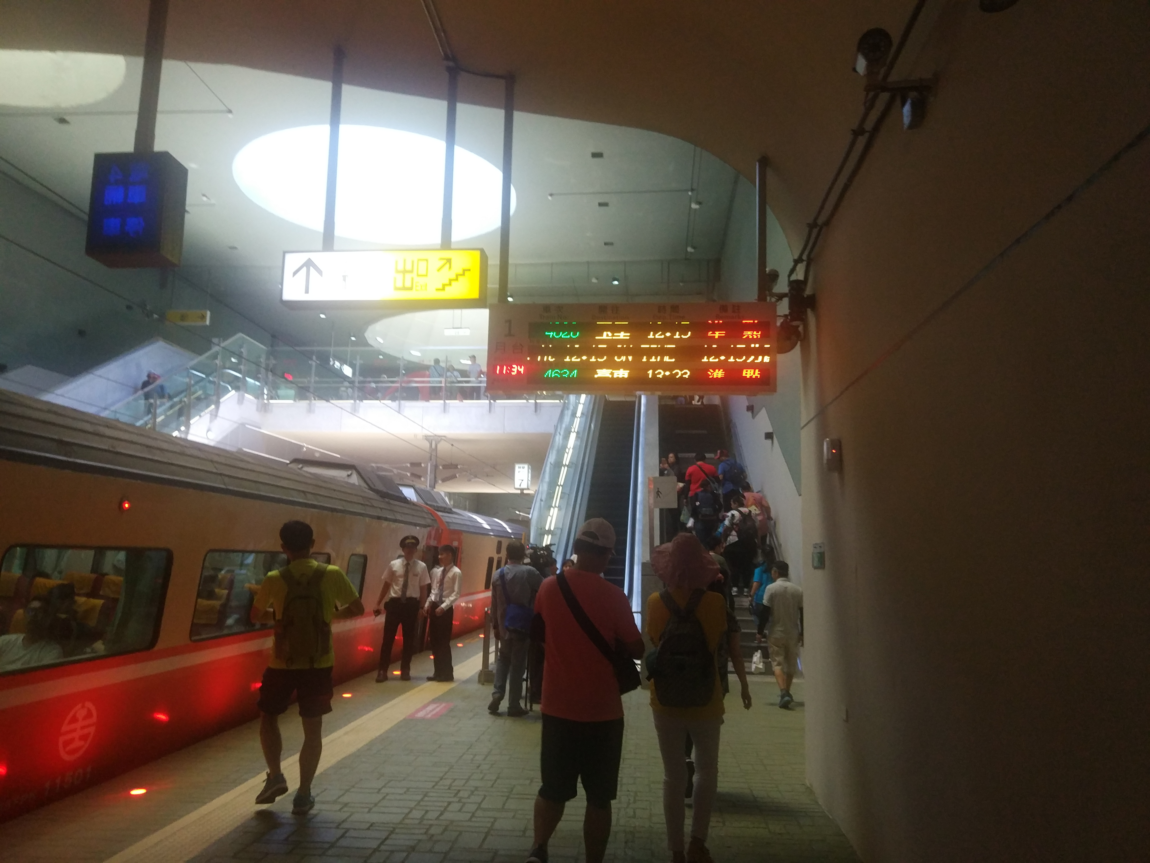 中文（台灣）: 台鐵林榮新光車站第一月台